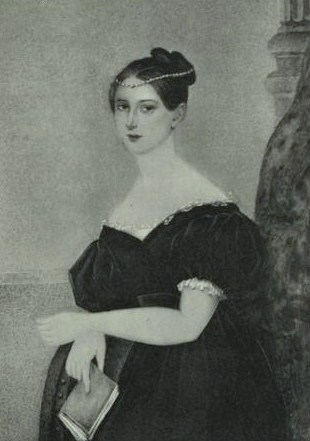 Мария Петровна фон Бреверн, урож. Есипова, дочь Петра Алексеевича Есипова и Веры Яковлевны фон Мерлин. Жена флигель–адъютанта императорской свиты, полковника Александра Ивановича Бреверн.